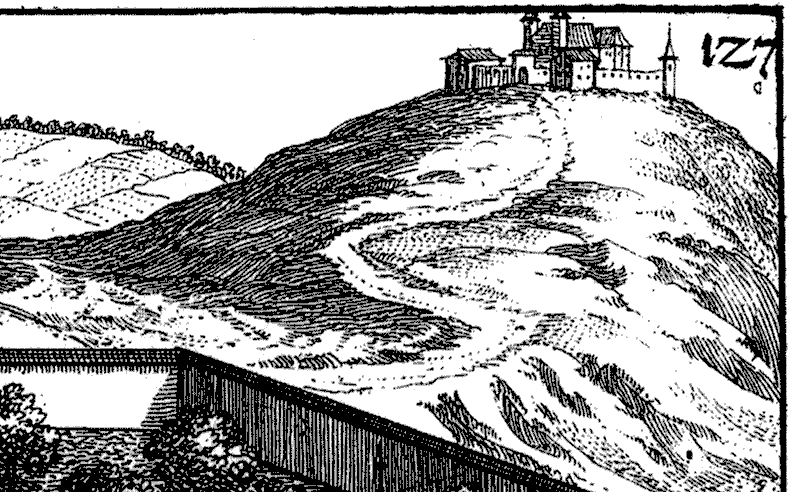 Wallfahrtskirche Maria Trost in Berg bei Rohrbach. Ausschnitt aus Tafel 127 der Topographia Austriae superioris modernae (Erschienen 1674)